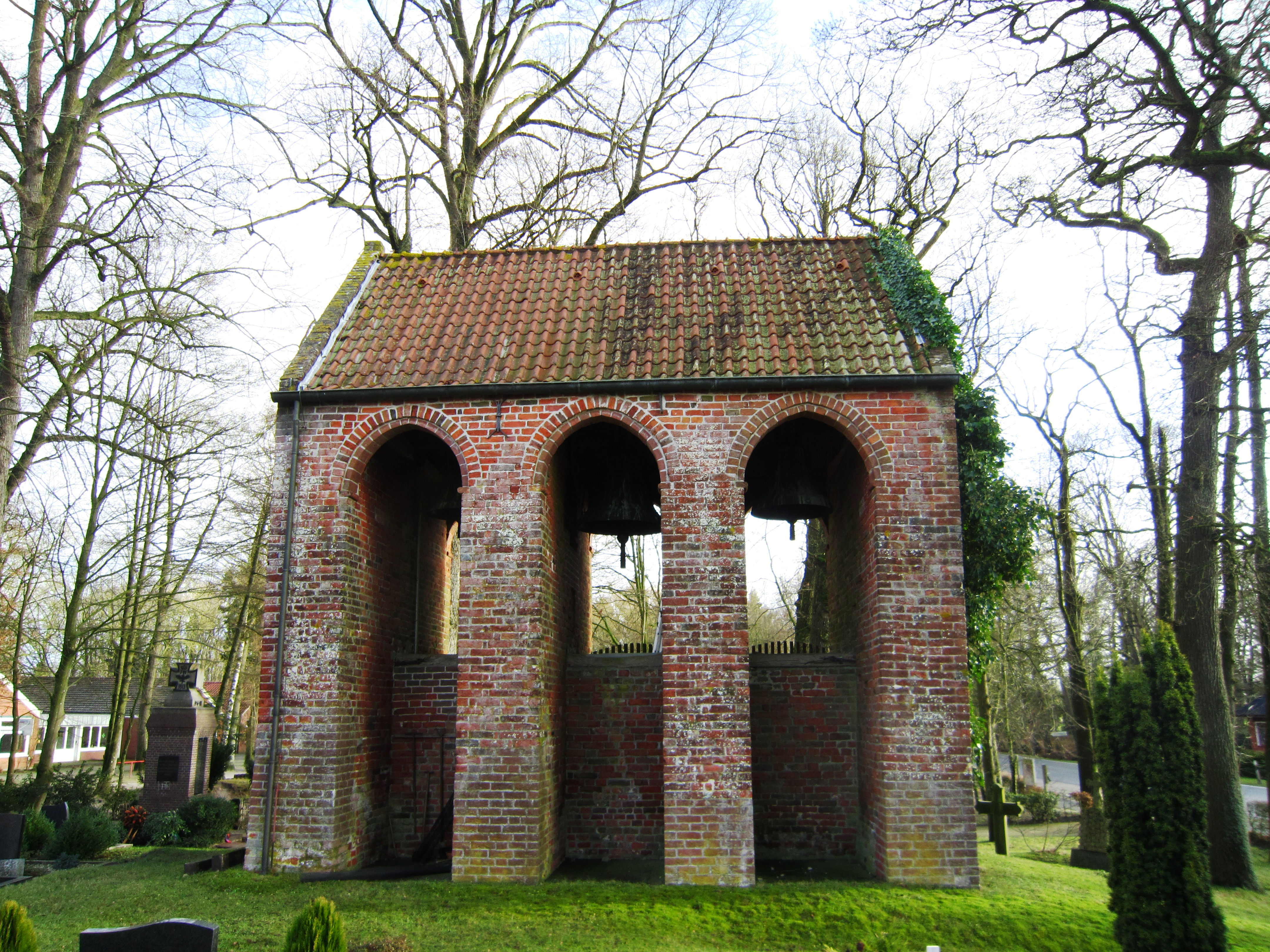 St.-Georg-Kerk (Nortmoor)